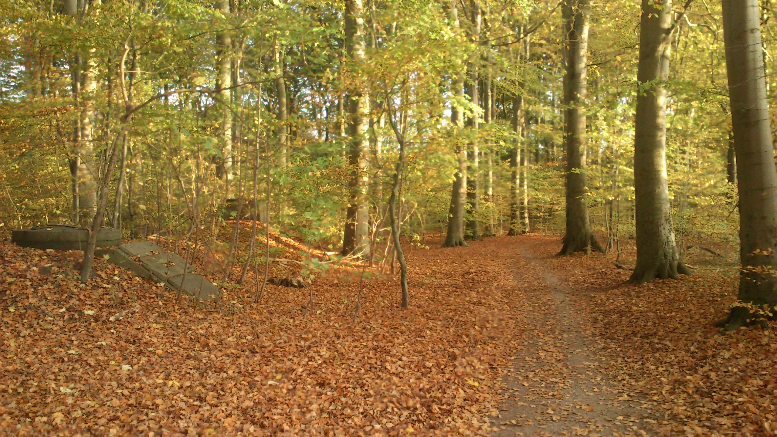 Nogle af beskyttelsesrummene i Riis Skov. Bunkerne stammer fra Anden Verdenskrig og der ligger en del af dem i den syd-vestlige ende af skoven.